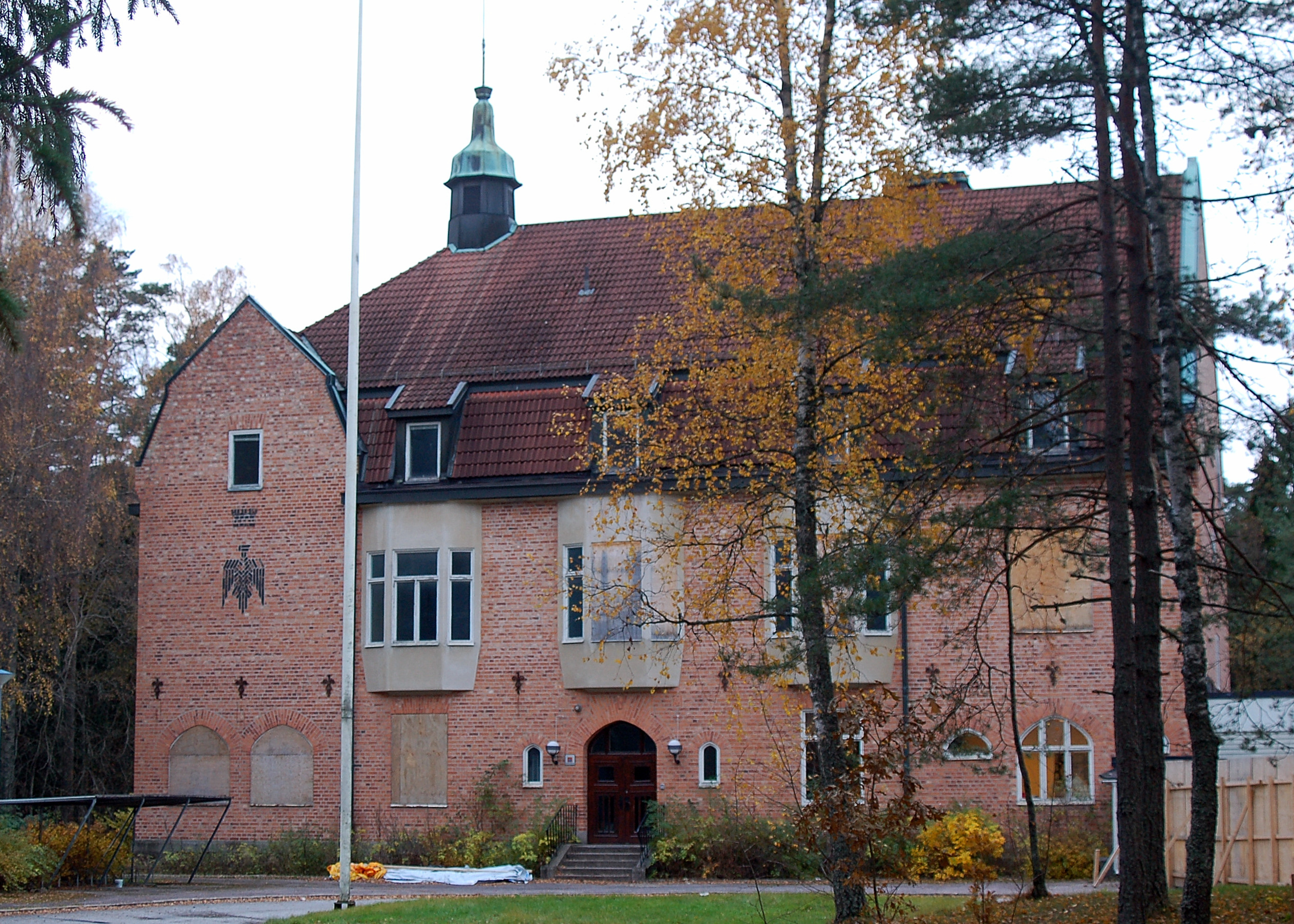 Adsolfsbergs Sanatorium.